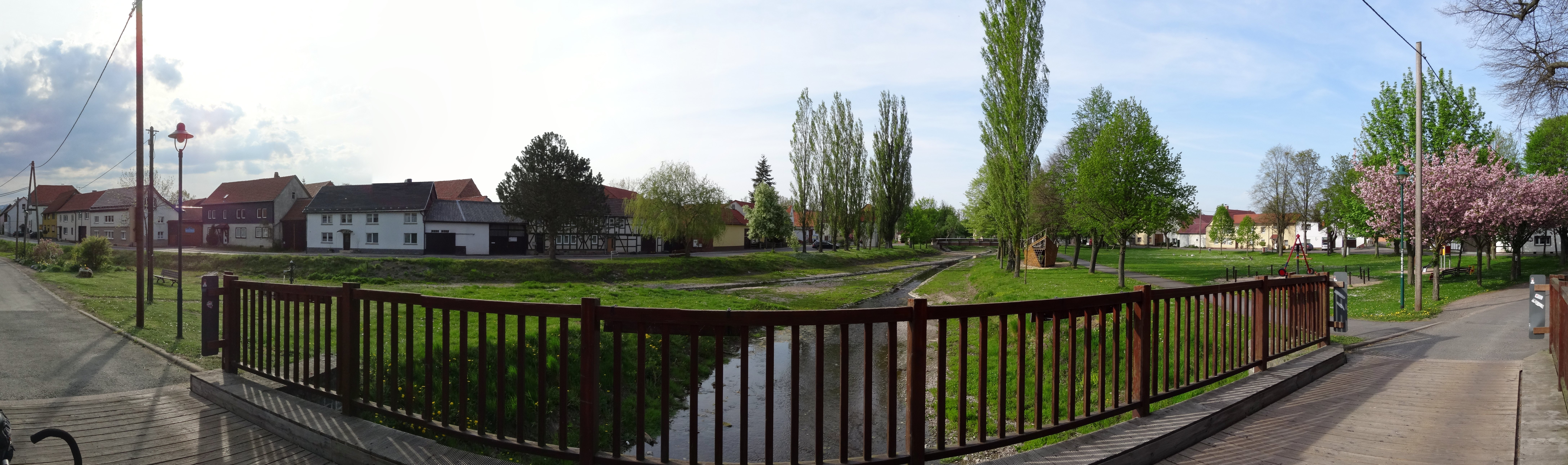 Altenwasser (vorne) und Leina (links) vereinigen sich zur Hörsel in Leina